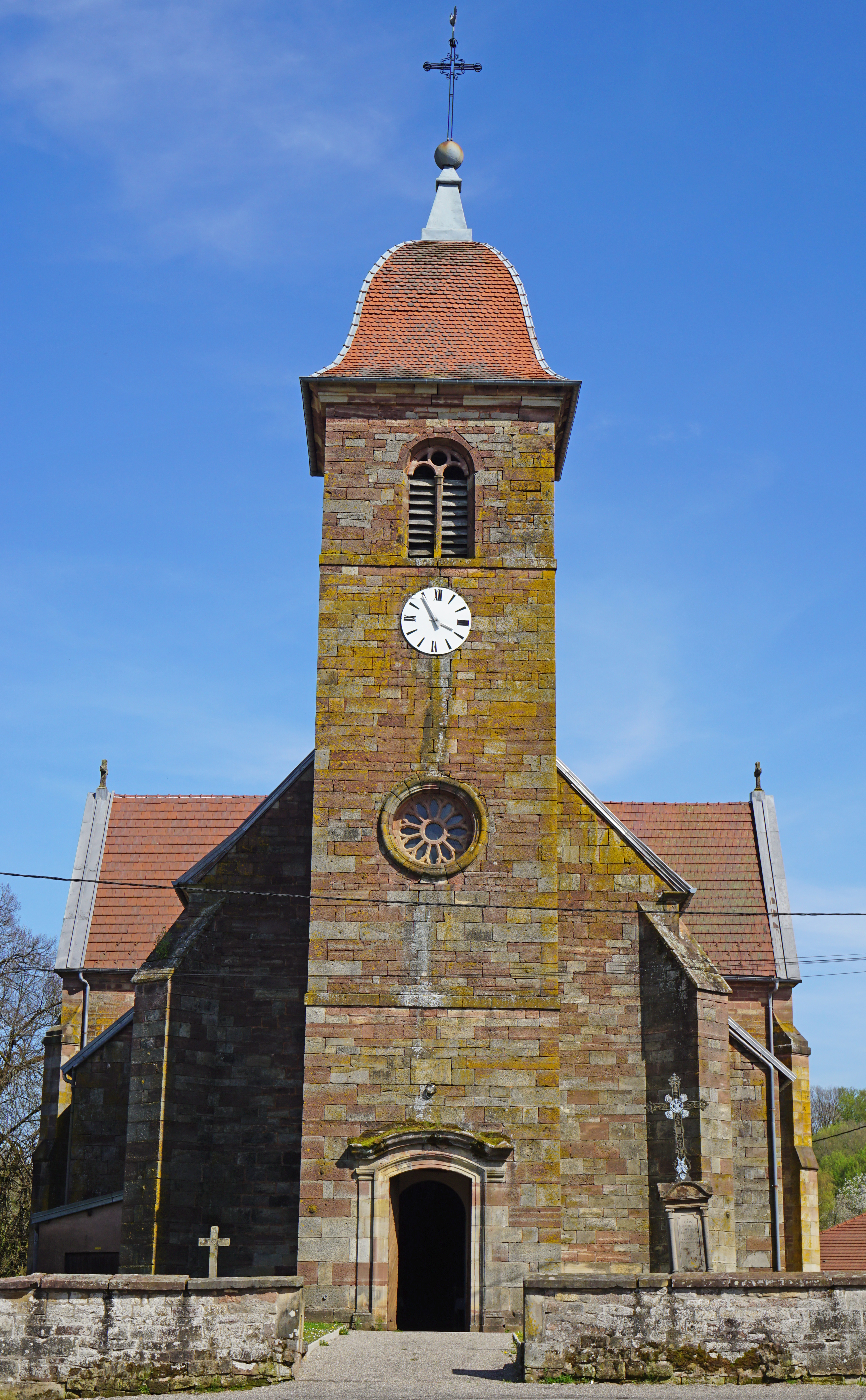 Église Saint-Martin de Lomont.